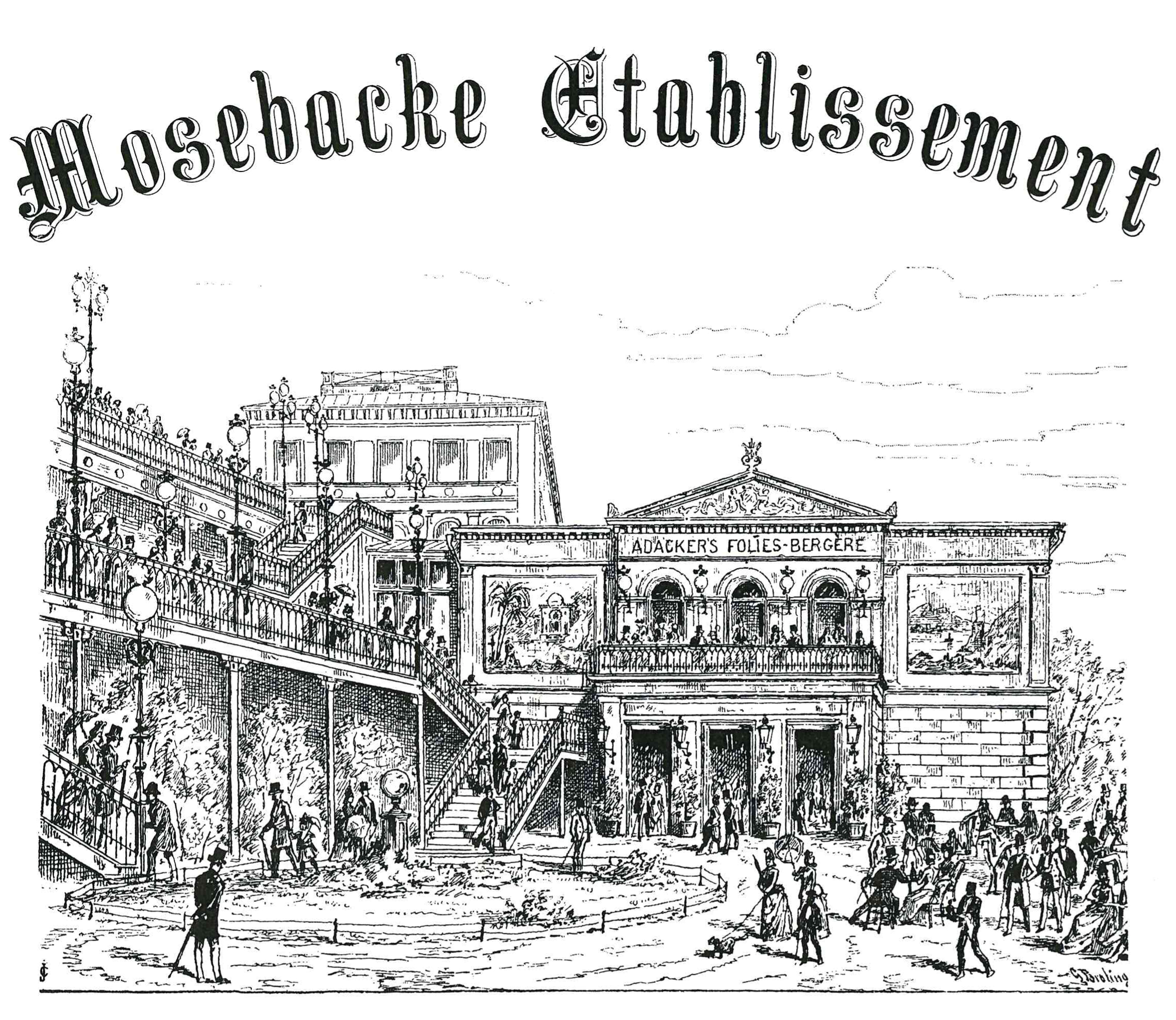 Mosebacke Etablissement. Tuschteckning av Gustaf Axel Broling Byggnadsår: 1887 Arkitekt: Carl August Olsson